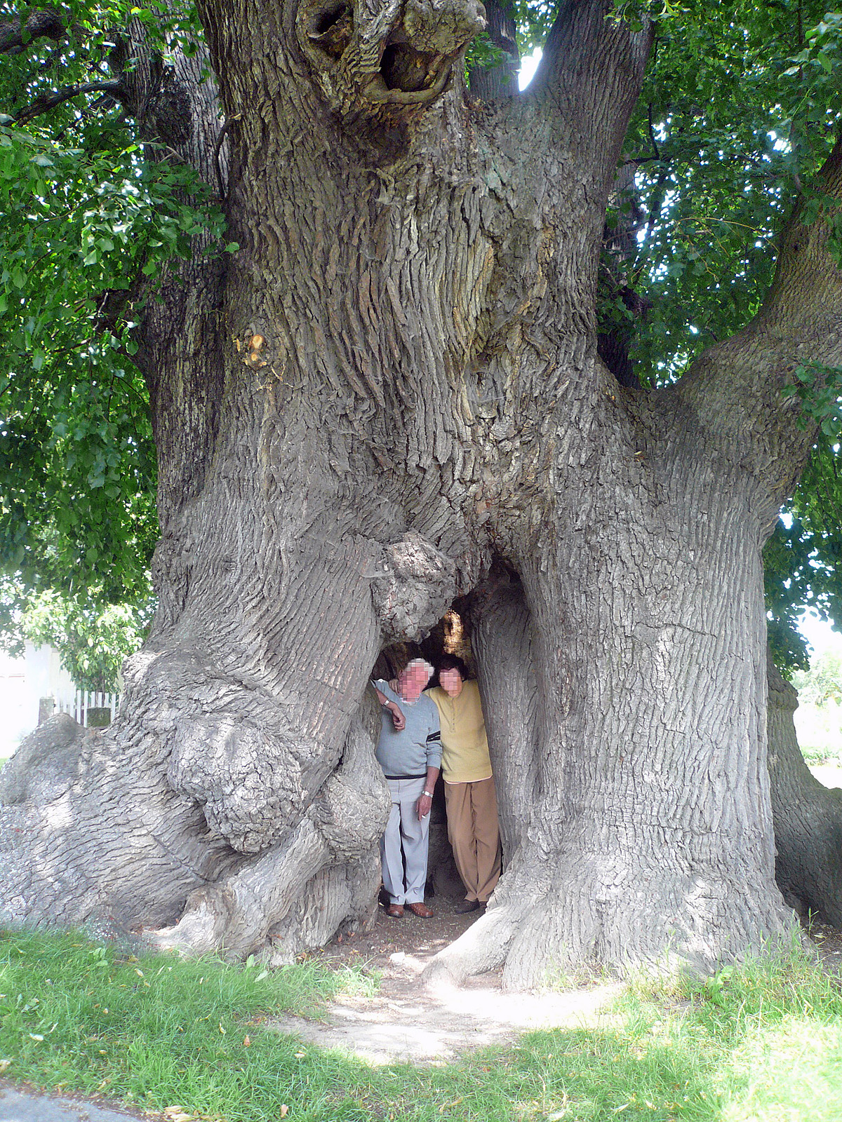 Schmorsdorfer Linde